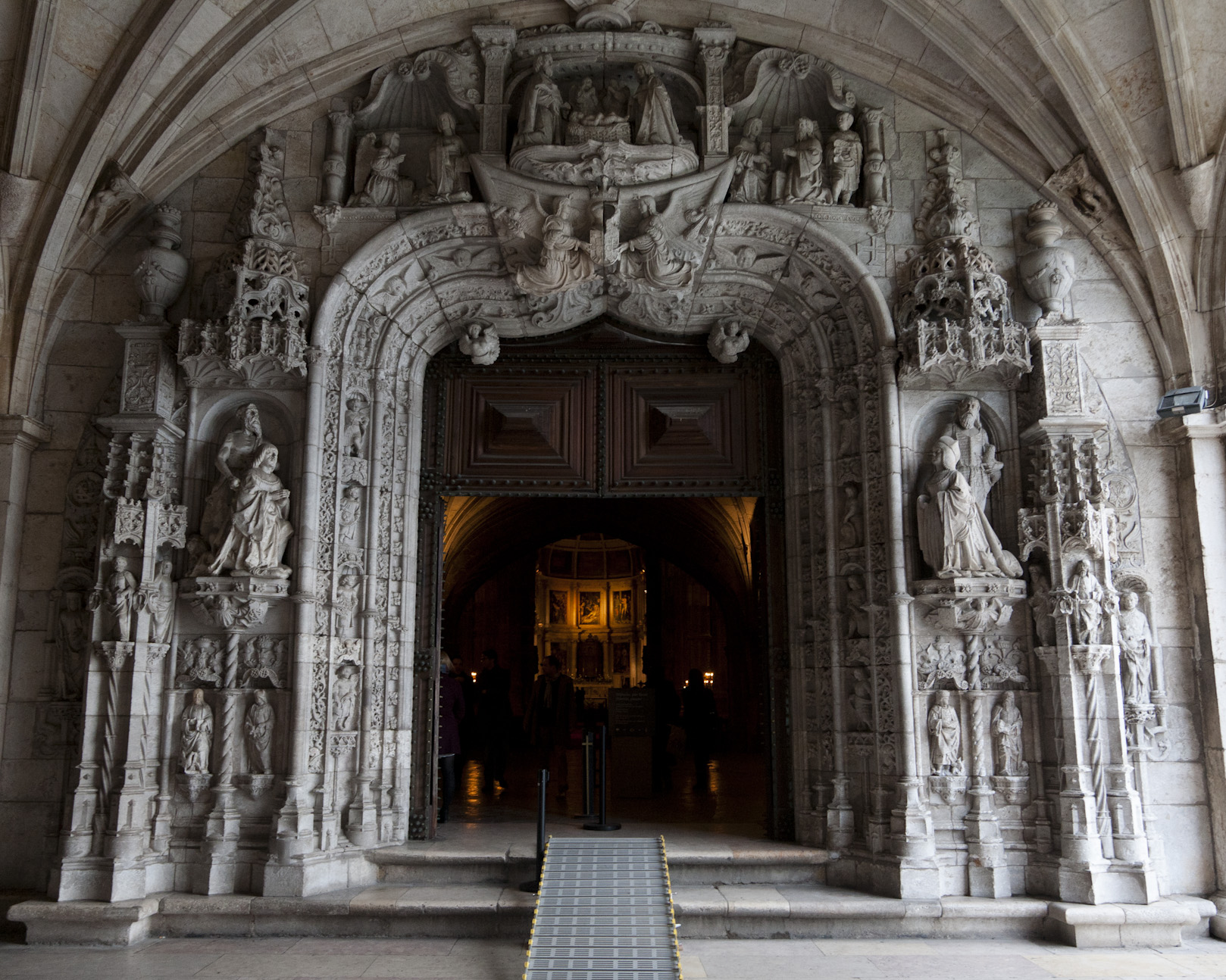 Nicolau de Chanterene, Portal Poente, Mosteiro dos Jerónimos, Lisboa